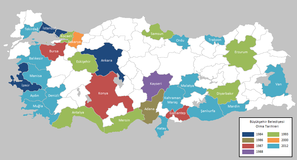 İllerin büyükşehir belediyesi olma tarihleri